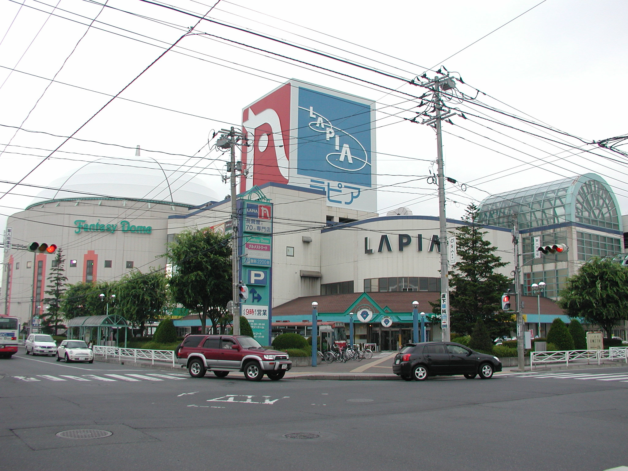 長崎屋八戸店を核とする、八戸ショッピングセンター『ラピア』（バスターミナル併設）